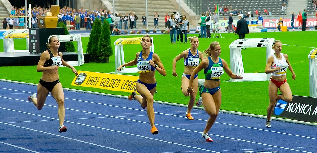 100m B-Lauf ISTAF 2006: Stepanka Klapacova, Jala Gangnus, Susann Dombrowski, Sina Schielke, Agnieszka Ceglarek